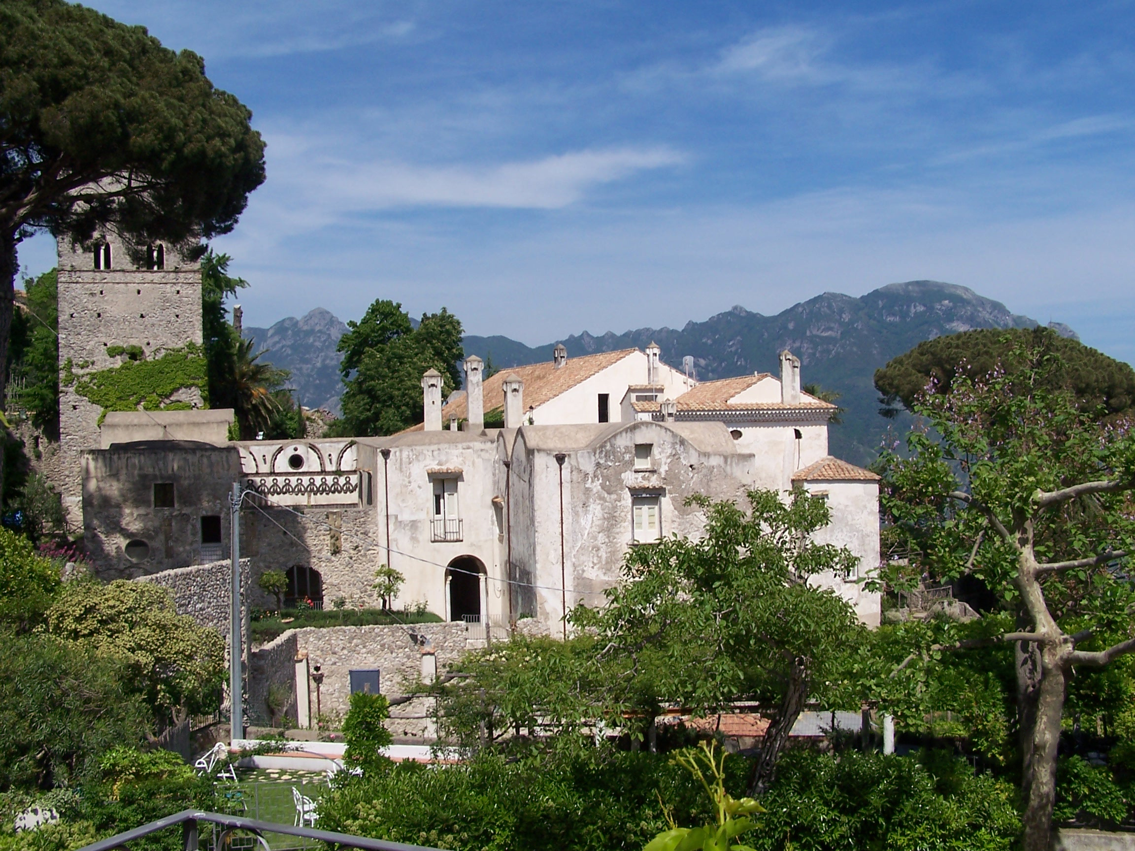 Veduta di Villa Rufolo da un vicolo di Ravello. Foto personale. Ravello (SA), 2005